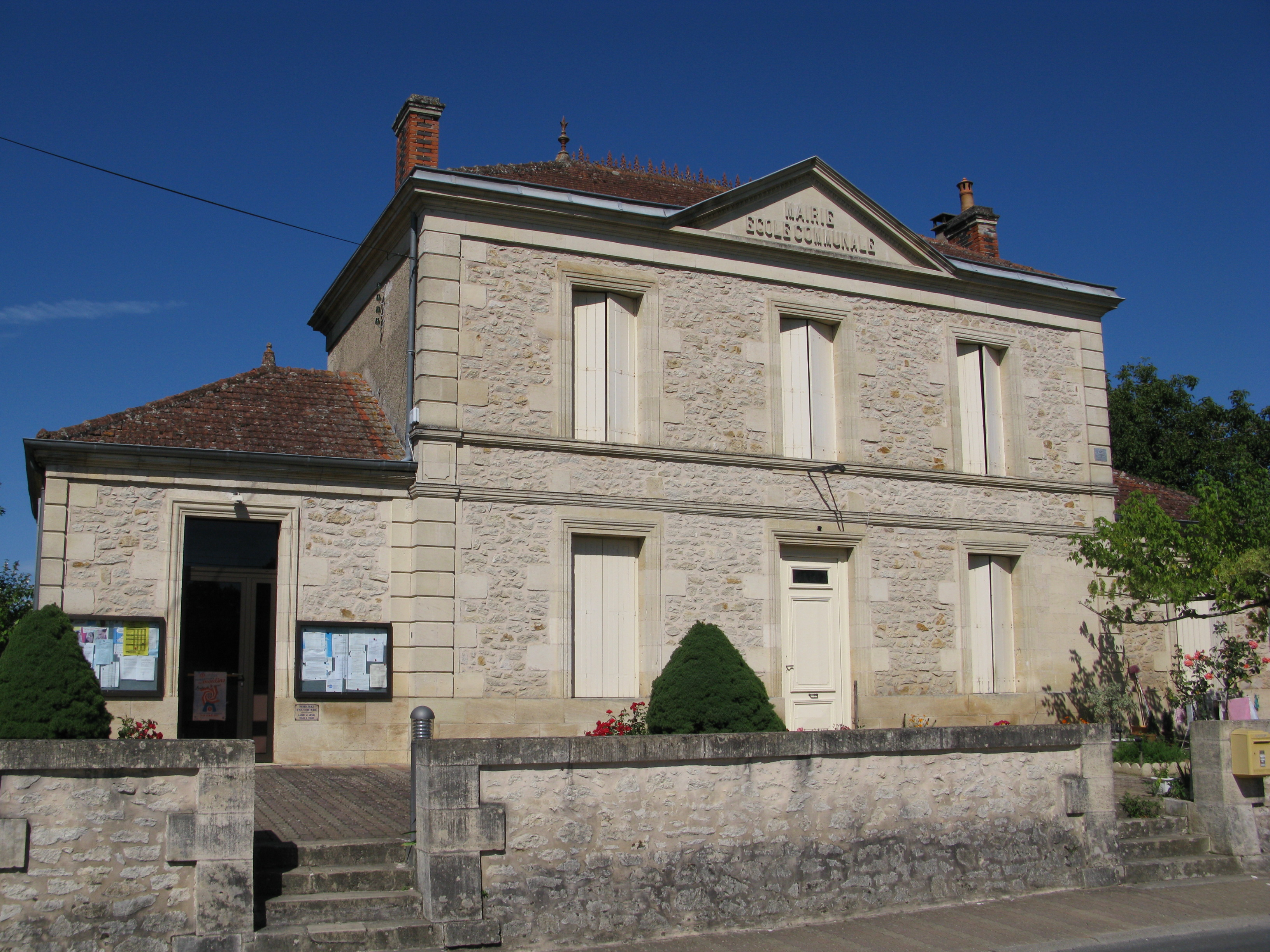 Mairie de Saint-Félix-de-Foncaude